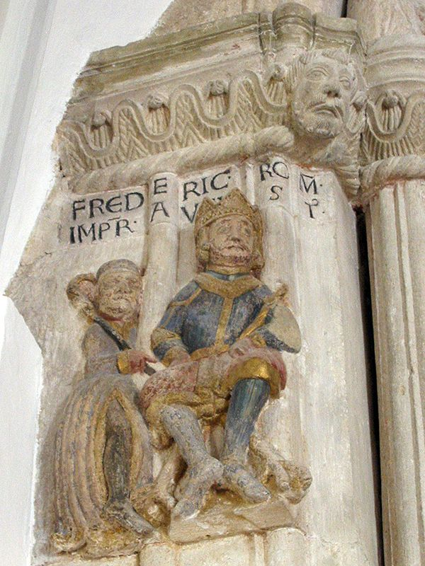 Kaiser Friedrich I. Barbarossa (reg.1152-1190 n.Chr.) am Innenportal des Freisinger Domes